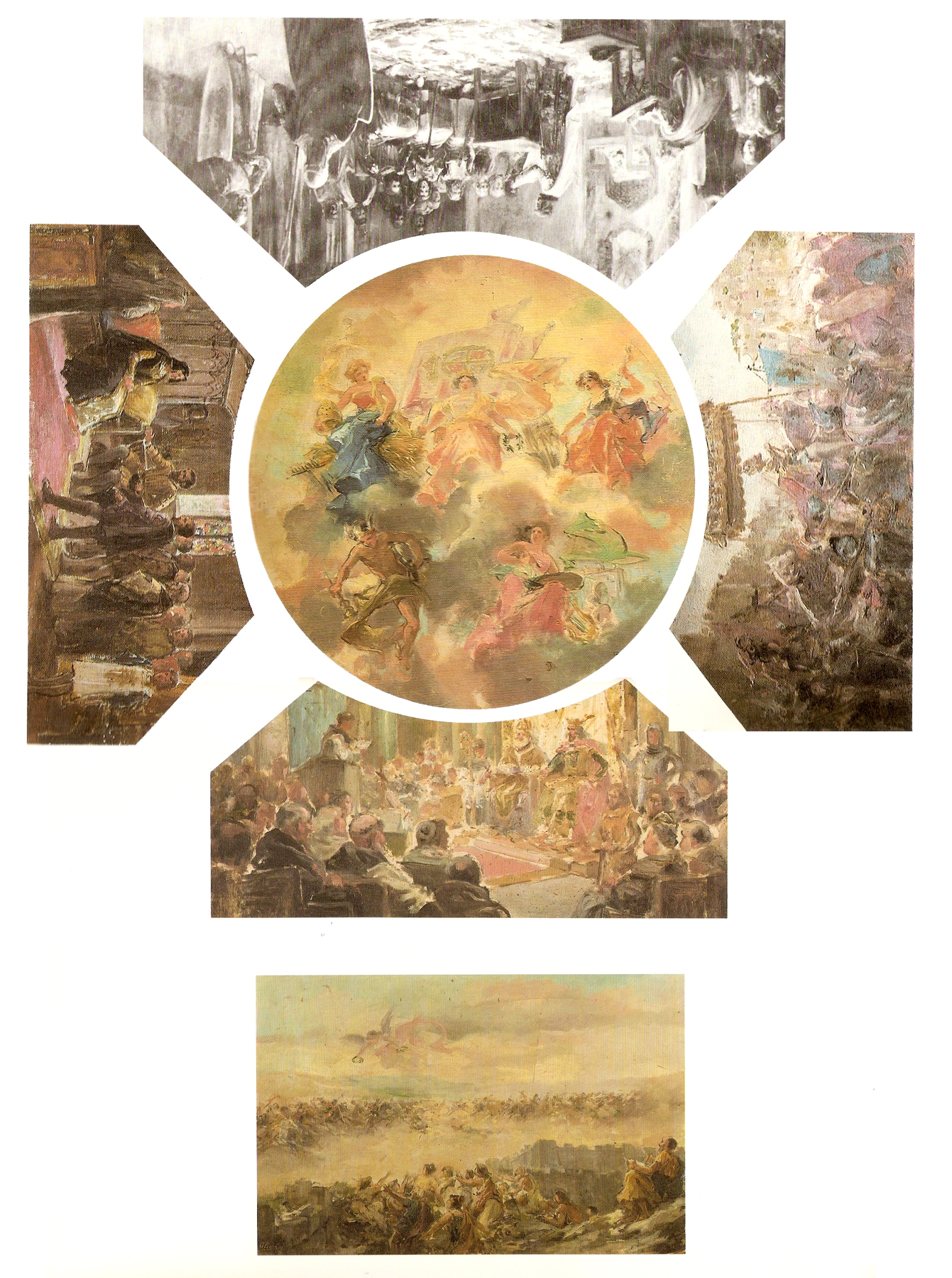 Reconstrucción, en base a los bocetos conservados, del techo de la Diputación de Palencia, obra de Eugenio Oliva, casi totalmente desaparecido.